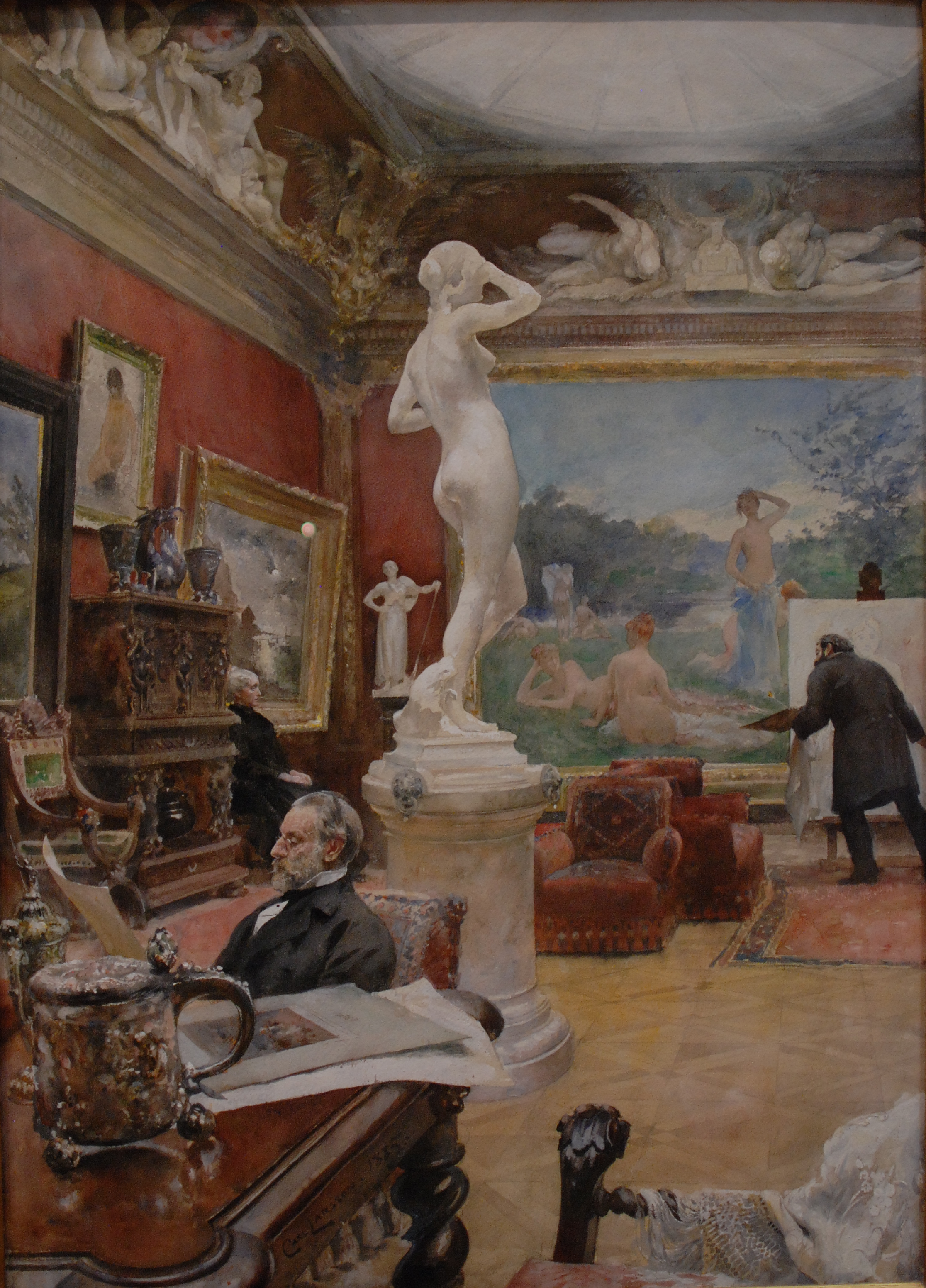 The Fürstenberg Gallery, Interiorlabel QS:Len,"The Fürstenberg Gallery, Interior"